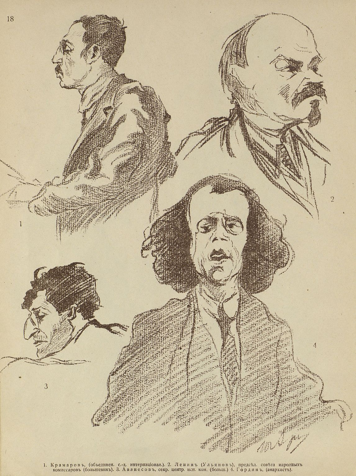 Арцыбушев, Юрий Константинович. "Диктатура пролетариата" в России: Политические деятели на заседаниях советов раб., солдат. и крест. депутатов, учредительного собрания, крестьянских съездов и проч. в декабре 1917 и в январе 1918 гг. : [Альбом] / Ю. К. Арцыбушев. - М. : Изд-во И. Кнебель, 1918. - 31 с. ил., портр. В 1926 году рисунки проданы автором Русскому заграничному историческому архиву (РЗИА) в Праге: сегодня ГА РФ (Р-7030, oп. 1). В настоящее время доступ к этому собранию полностью открыт.